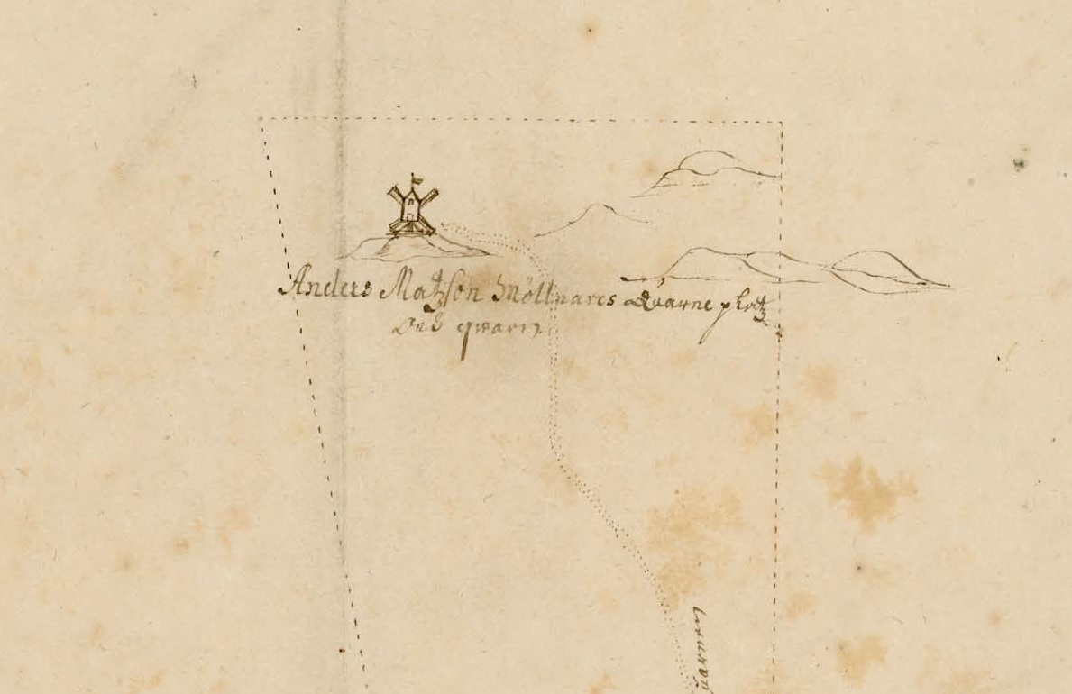 Almens kvarn eller Gubbhuskvarnen (mjölnaren Anders Matssons quarn), Holms tomtbok 1679